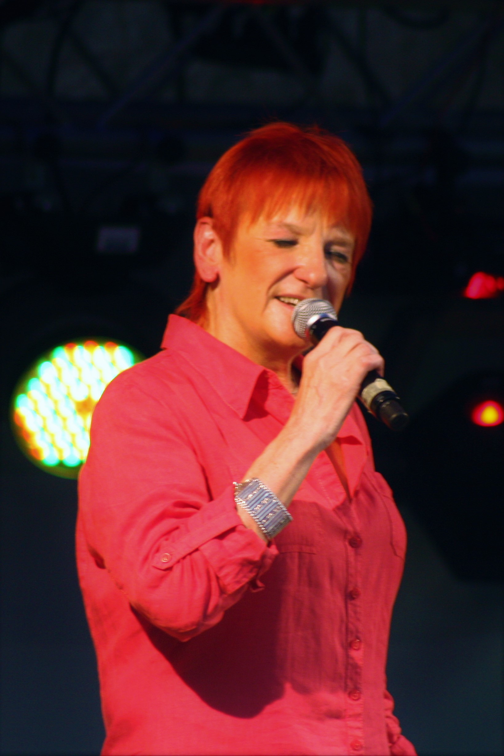 Jana Koubková na Prague Pride 2011.